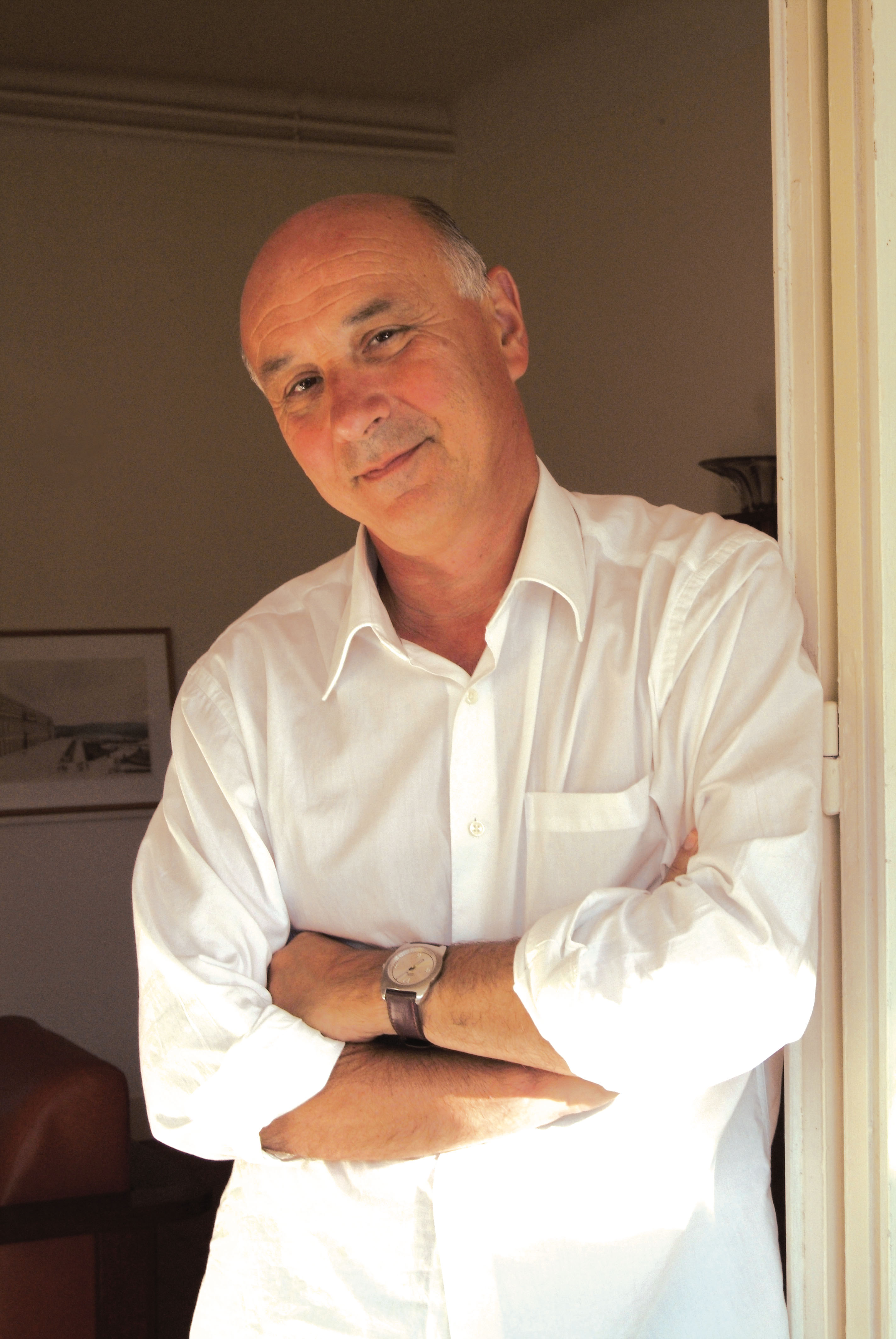 portrait de l'auteur réalisé à Biarritz